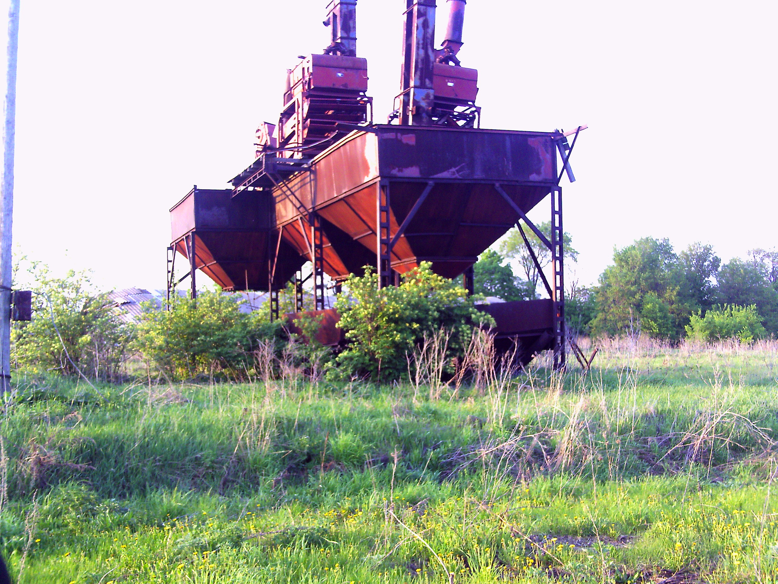 ЗАВ20